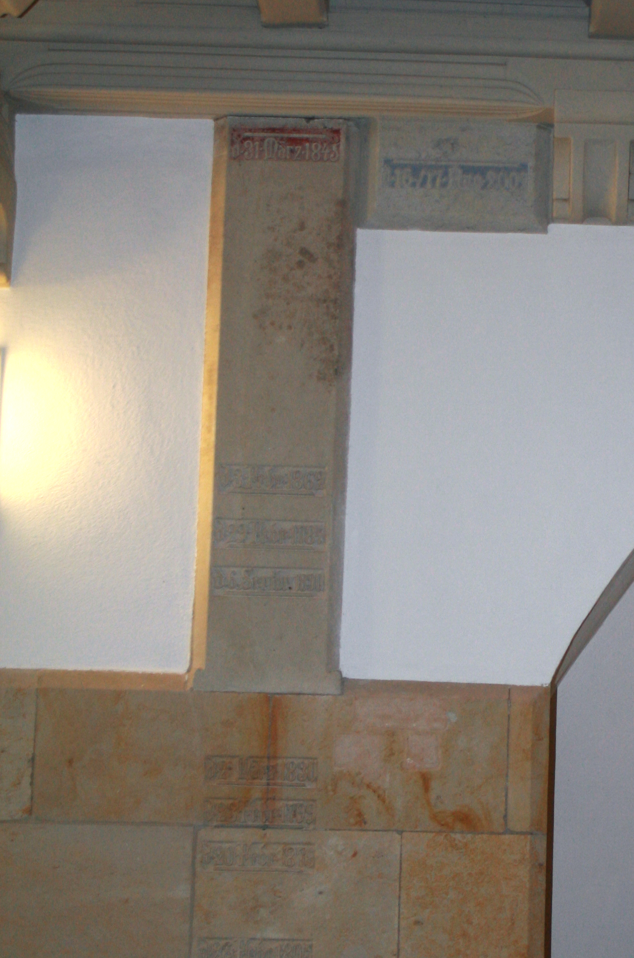 Hochwassermarken in der Kirche von Bad Schandau